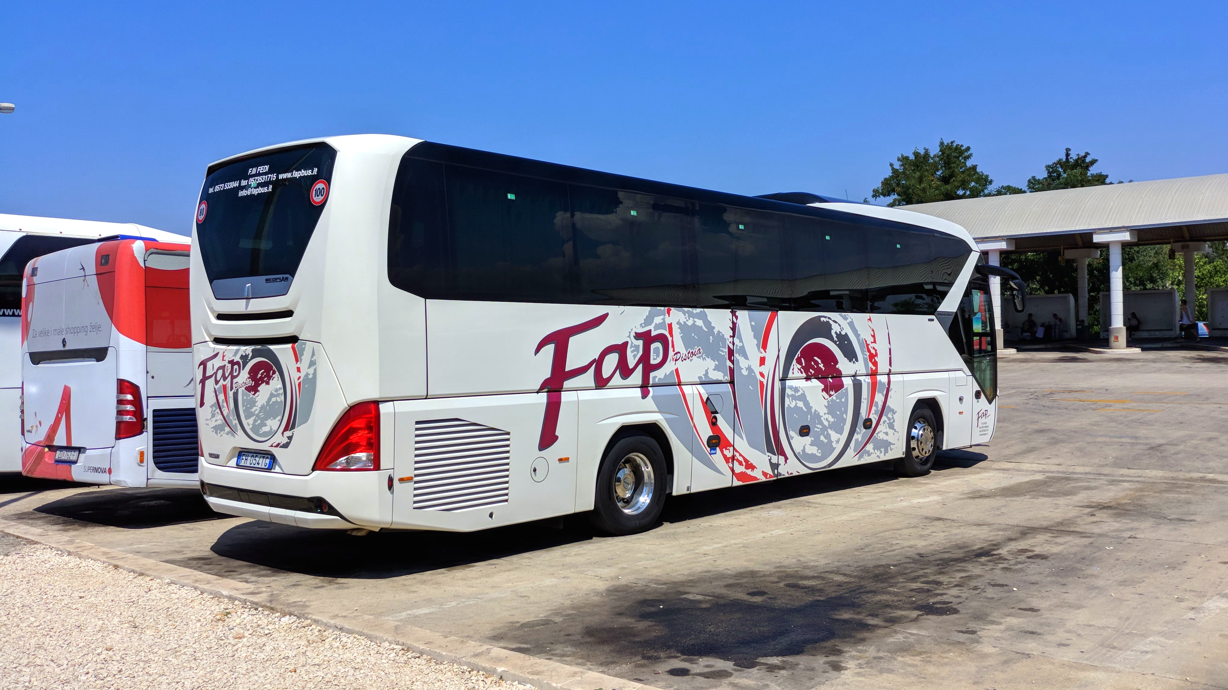 Ein Neoplan Tourliner der italienischen Fap Bus steht am Autobusni Kolodvor in Zadar, Kroatien neben einem Mercedes-Benz Citaro Facelift der Liburnija Zadar und einem Neoplan Starliner von Antonio Tours.